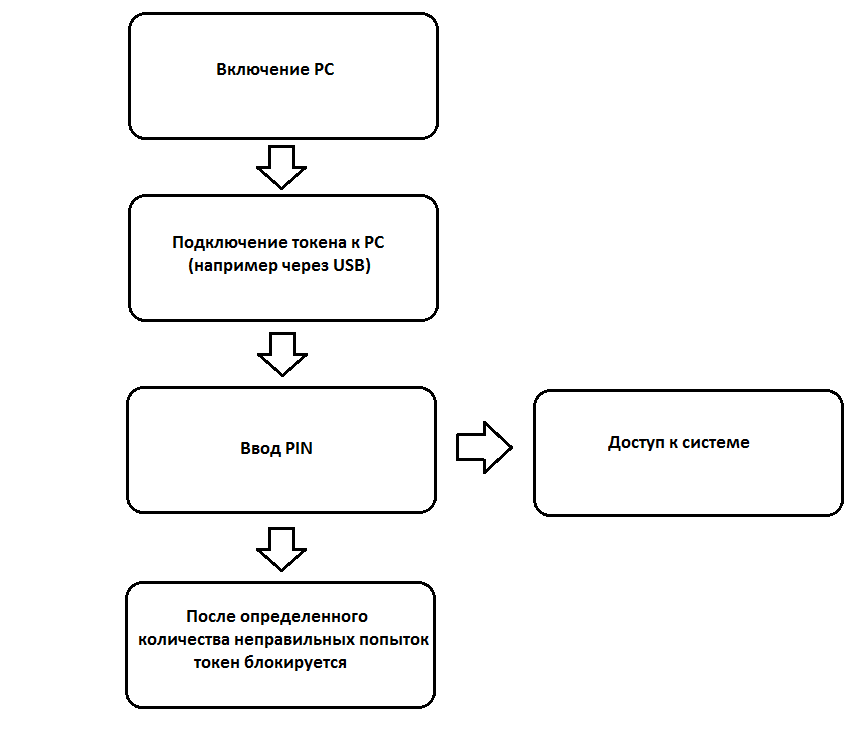 Алгоритм использования токена